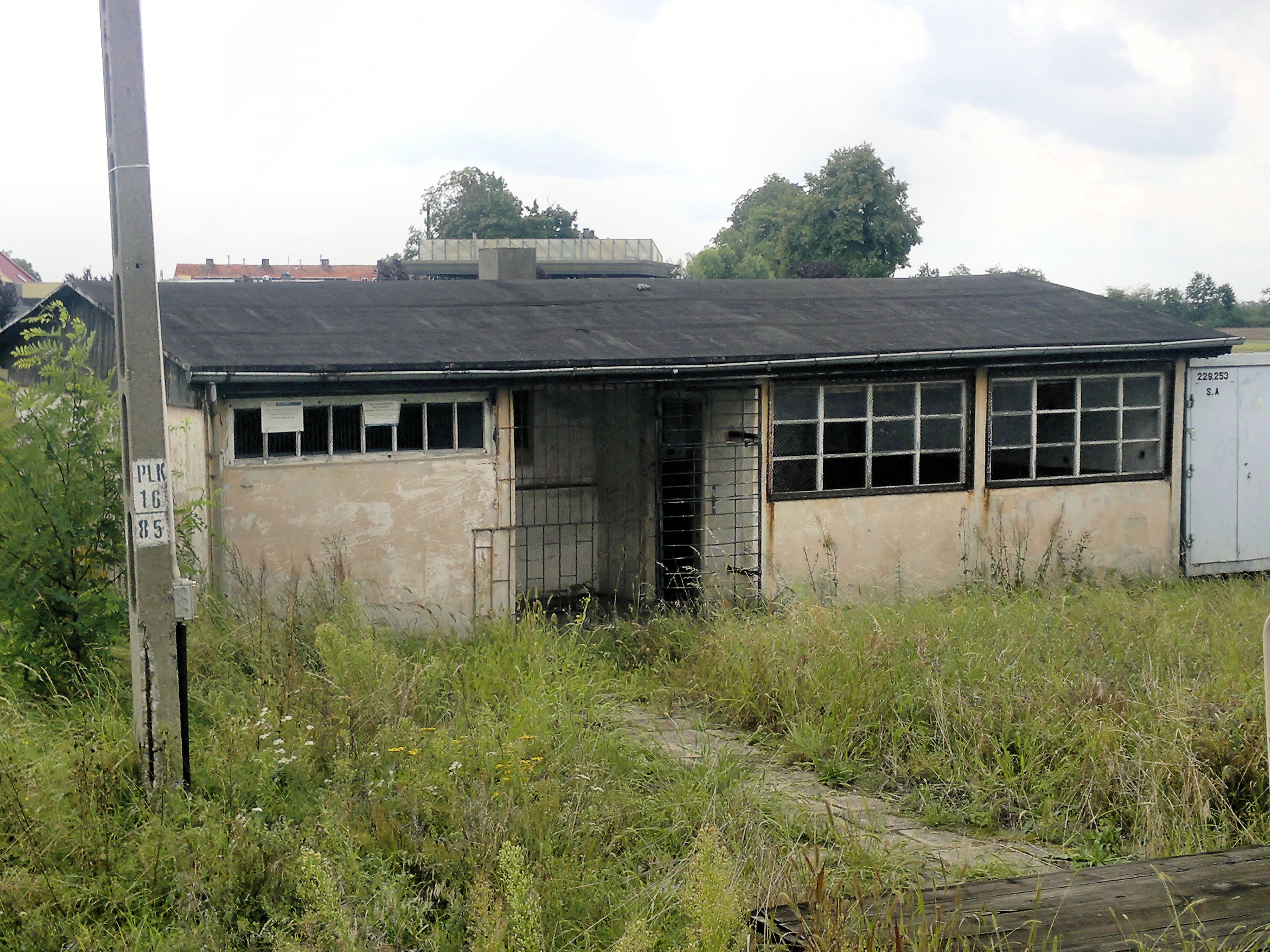 Budynek przystanku kolejowego stan sierpień 2012